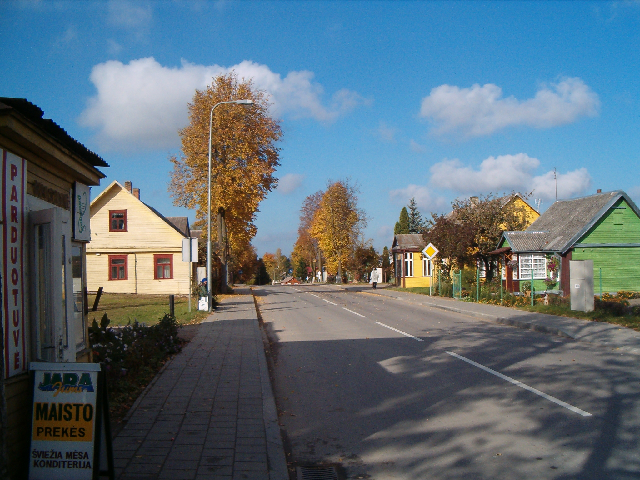 Kurkliai, Lithuania